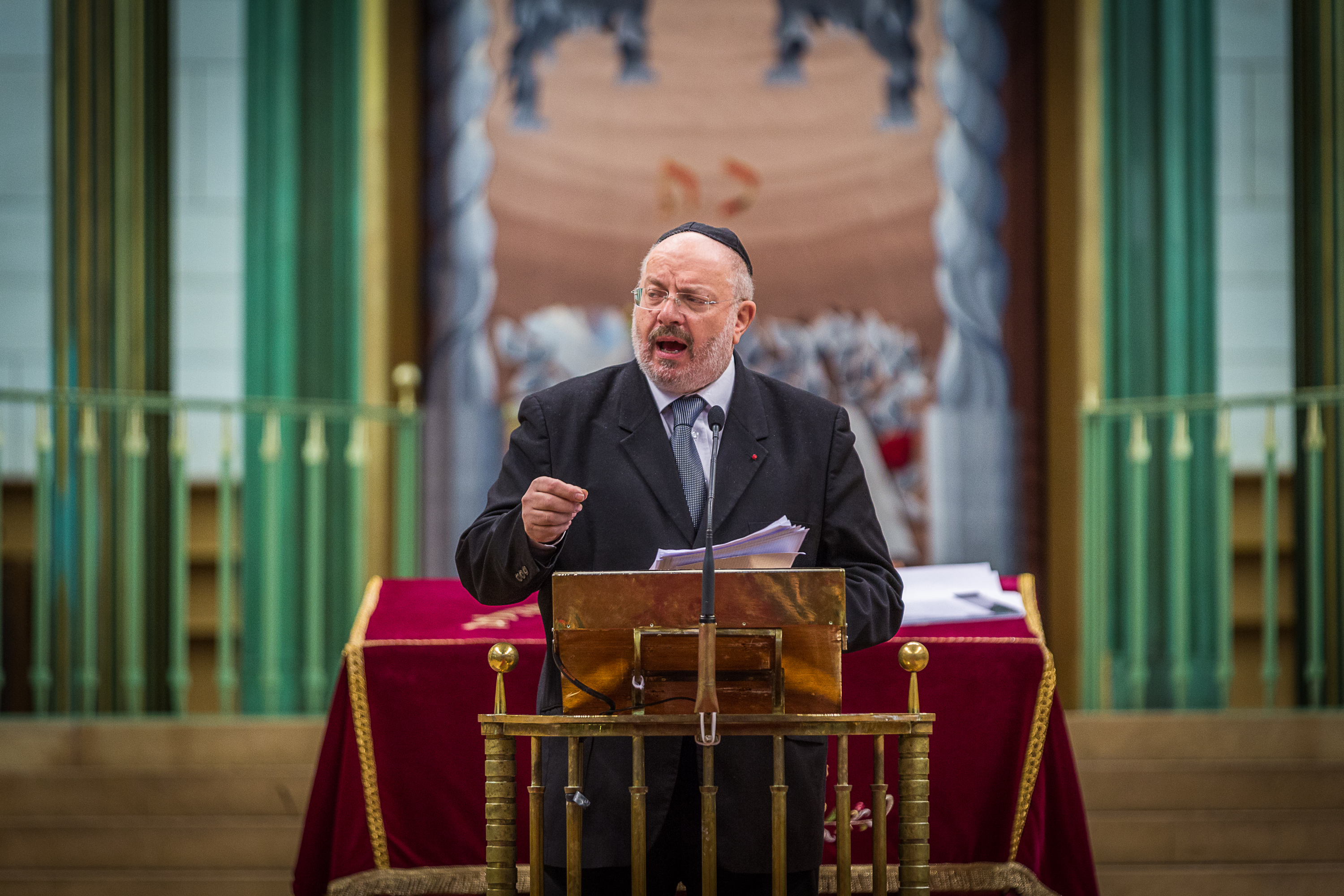 36e rencontres internationales de Taizé Strasbourg 28 décembre 2013